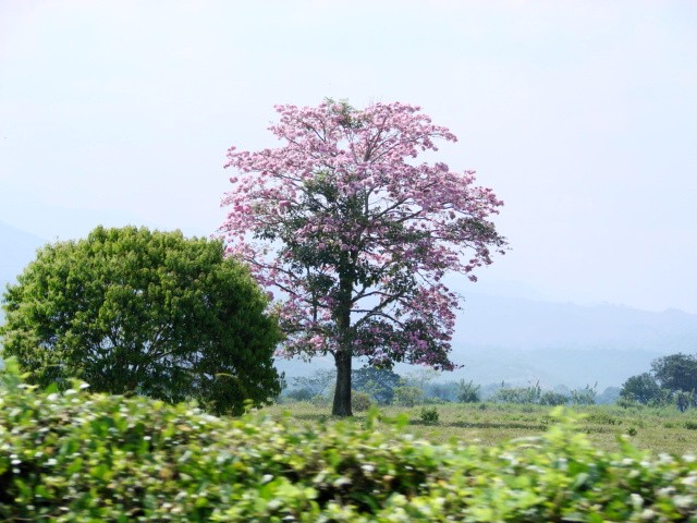 Jamundí, Valle del Cauca, Colombia